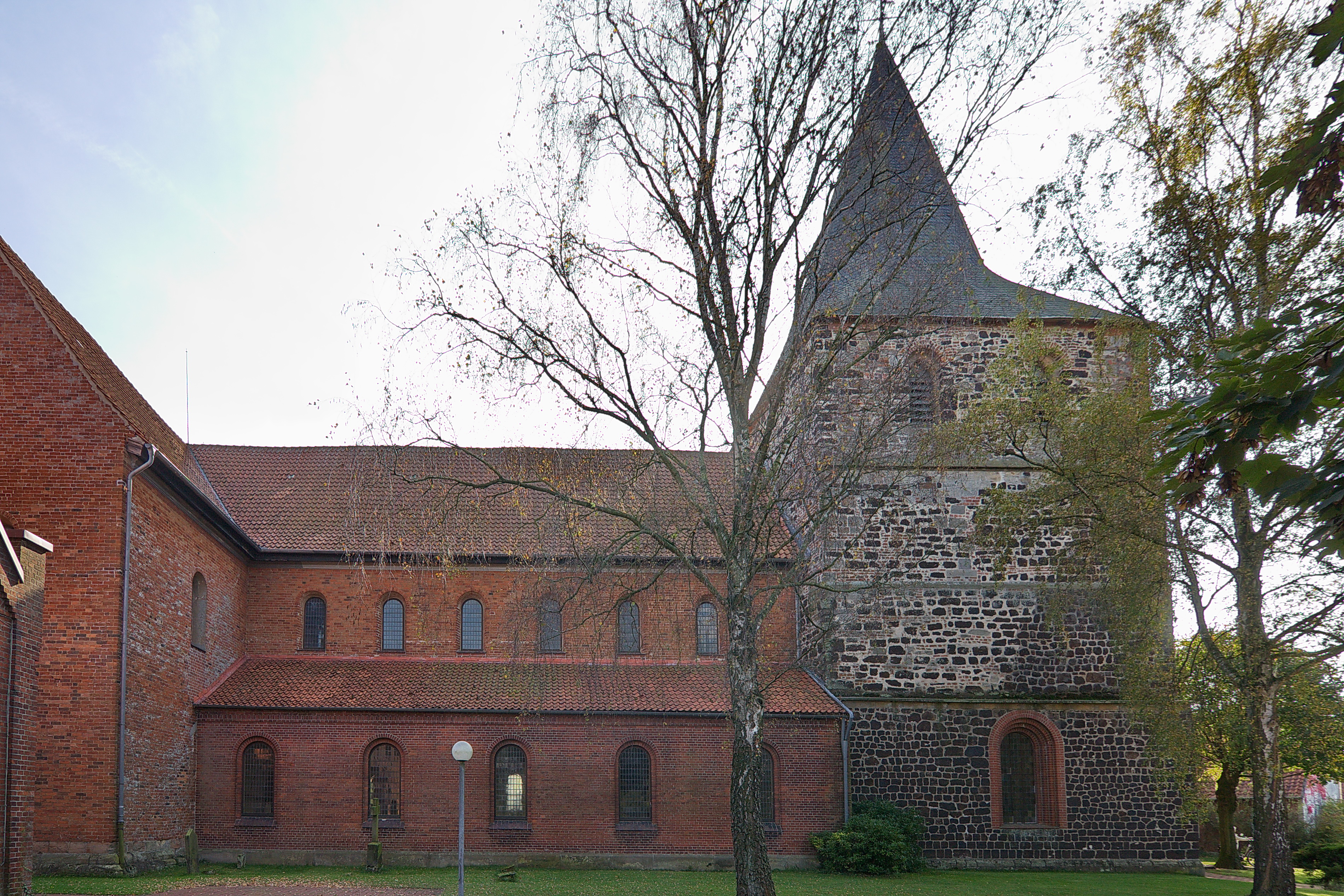 St. Osdag-Kirche in Mandelsloh (Neustadt am Rübenberge), Niedersachsen, Deutschland